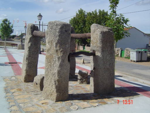 VIsta general del potro de herrar de VIllar de Corneja, Ávila.